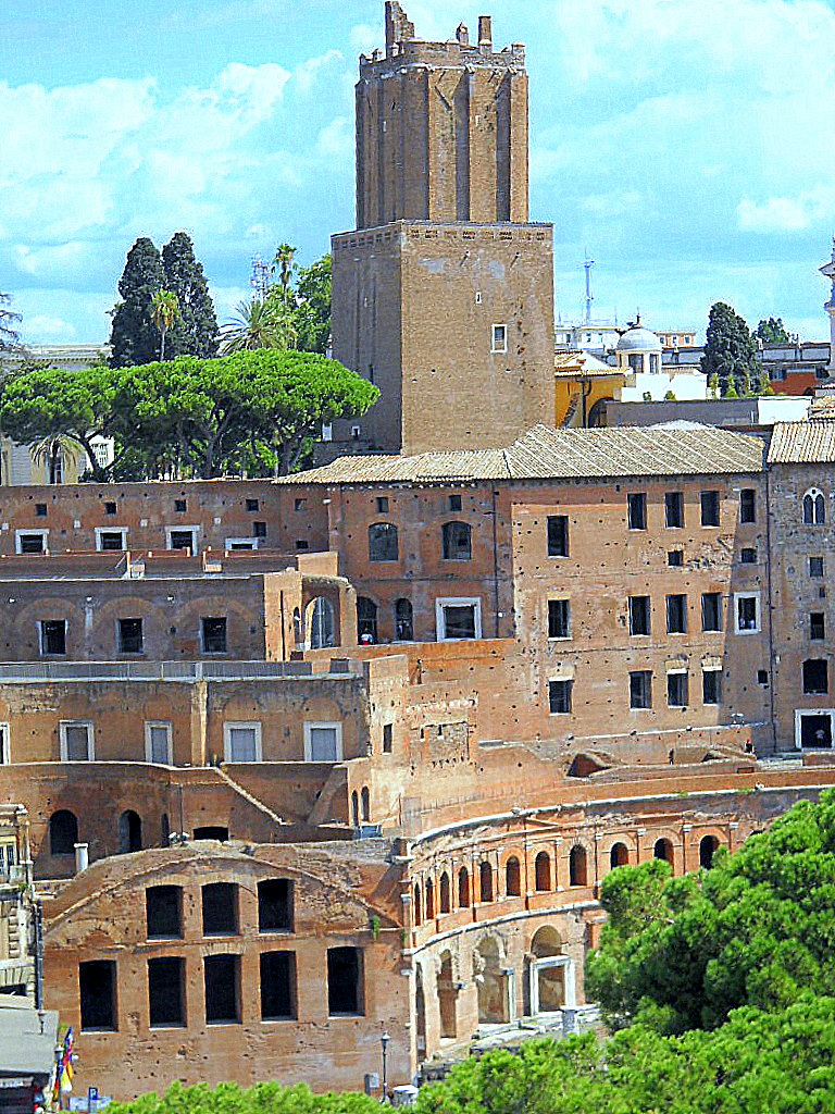 Torre delle Milizie